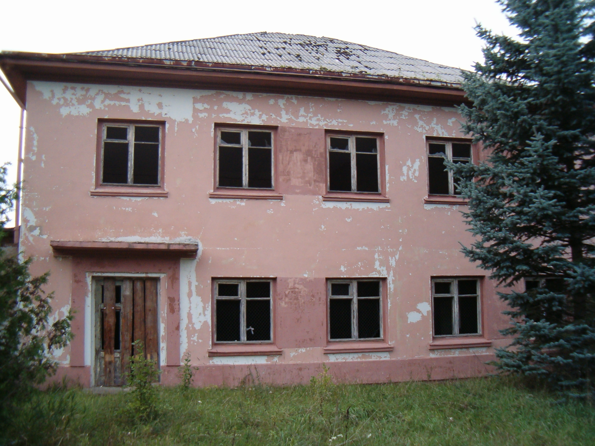 Pauriškiai, Lithuania